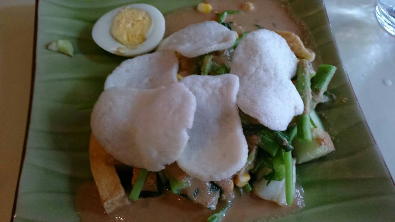 中文（香港）: 有莧菜的加多加多